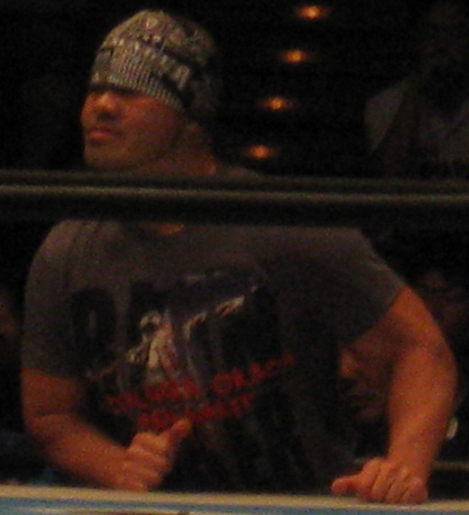 9月29日 神戸大会 「DESTRUCTION」 外道